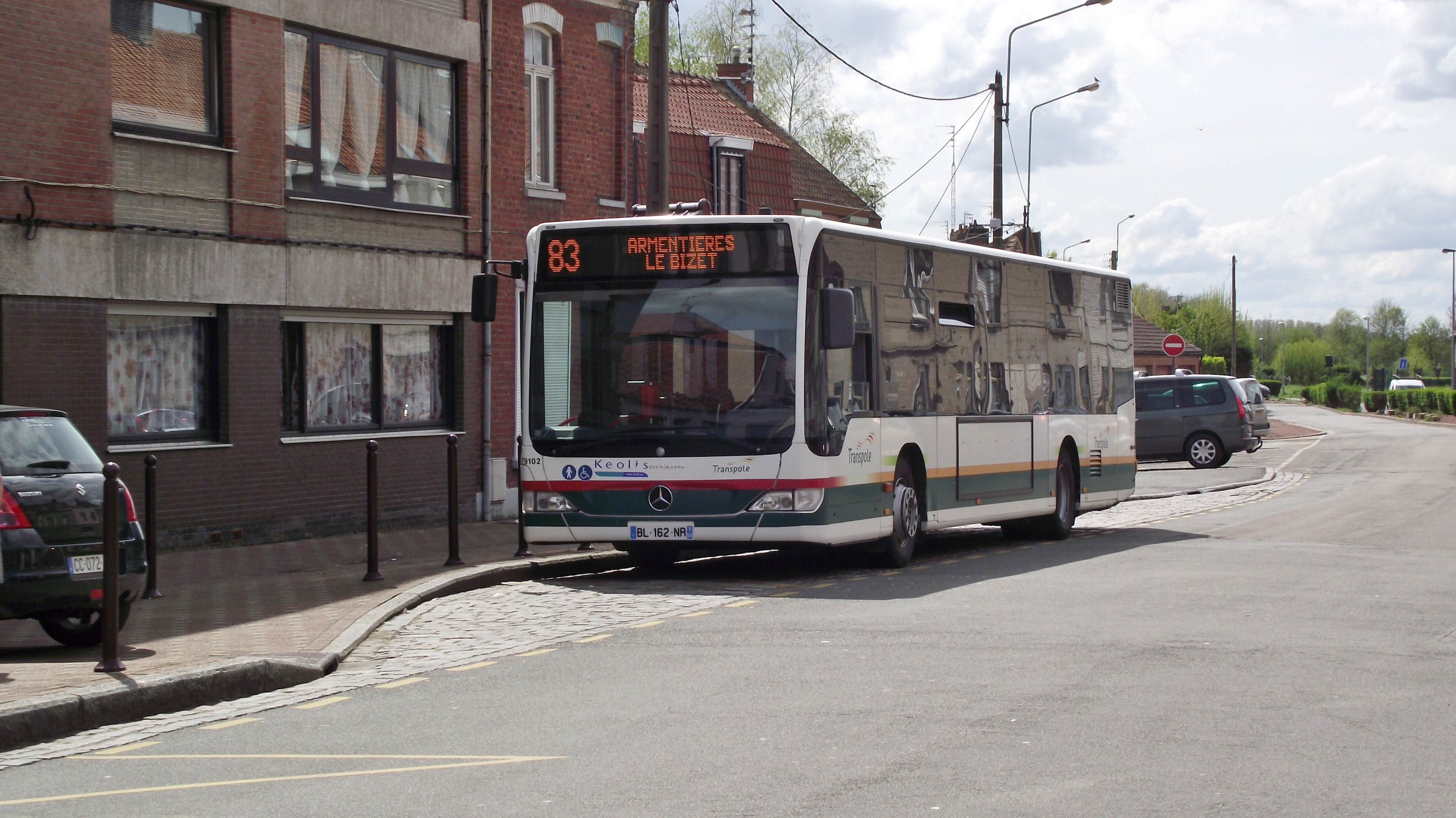 Buslijn 85 Armentières-Bizet aan de grens